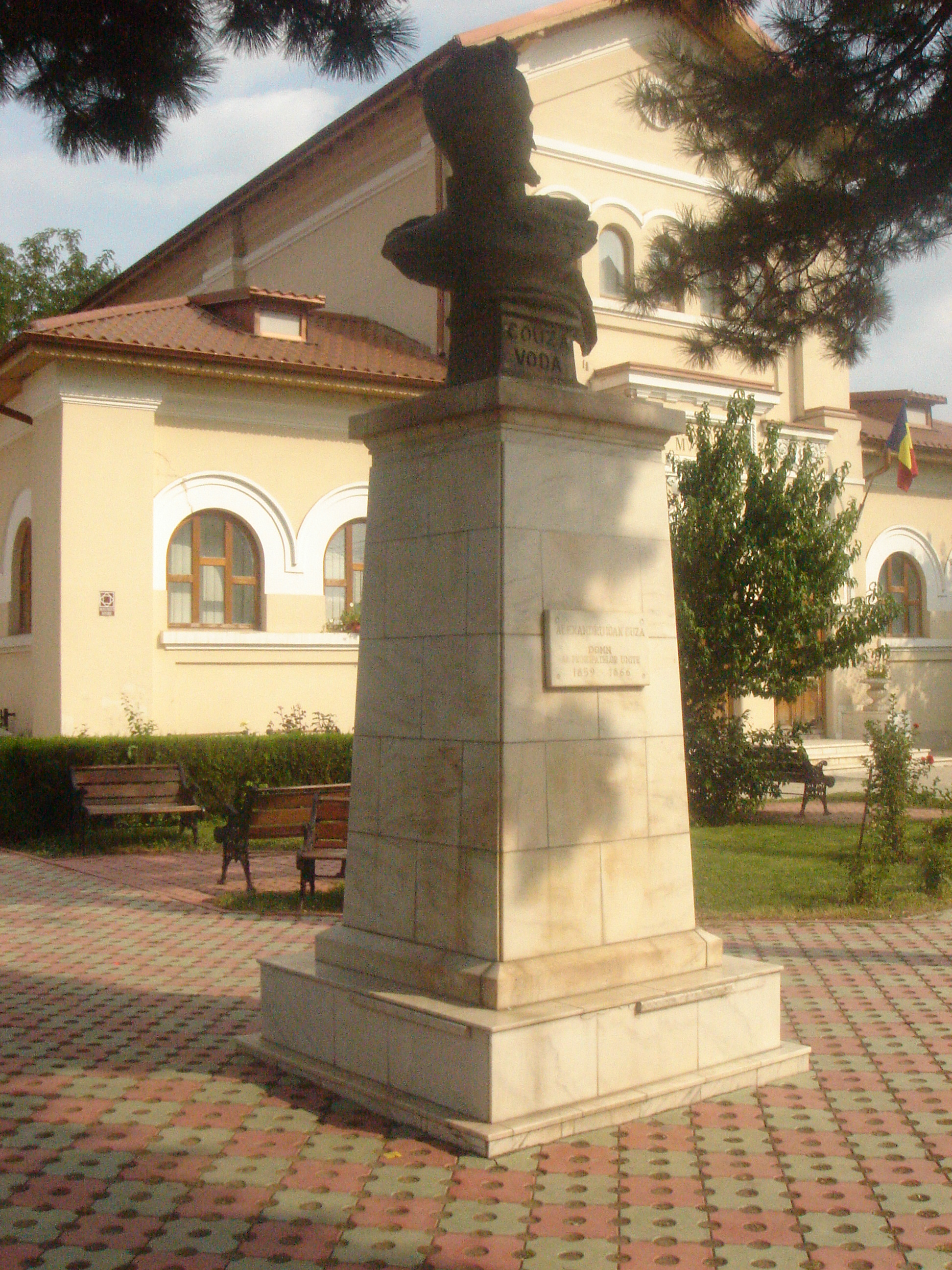 Se afla in fata Casei Memoriale Alexandru Ioan Cuza, construita pe fosta casa a Parcalabului de Galati, devenit domnitorul ce a intemeiat Mica Unire.